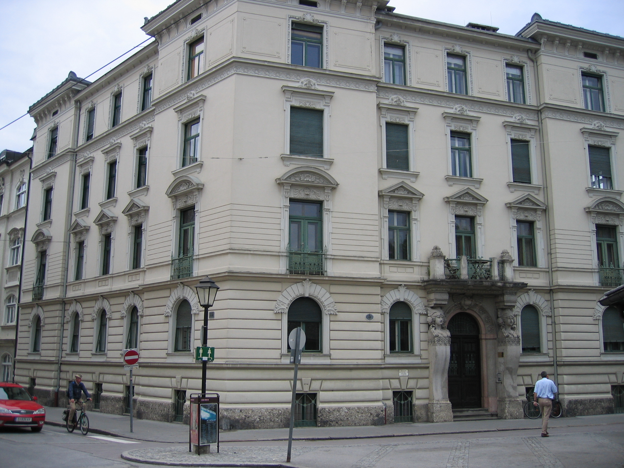 Salzburg, Haydnstraße 5, das Jugendstil-Wohnhaus, wo sich zwischen April 1918 und November 1936 die Wohnung des Malers, Schriftstellers und Kunstsammlers Adolph Johannes Fischer befand, die laut Zeitungsberichten „einem Museum oder einer Galerie“ gleich und daher von der Salzburger Festspielprominenz als Sehenswürdigkeit wahrgenommen wurde.